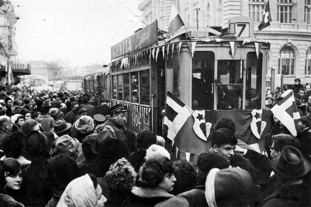 Photo: ASL Cette photo a peut être été prise le 6 janvier 1964, dernier jour de la ligne 7 à la place Saint-François, c'était le dernier tram qui effectuait le parcour La Rosiaz-Renens. (A voir le monde, je pense que les citoyens de lausanne ne devaient pas être pour la disparition des Trams)